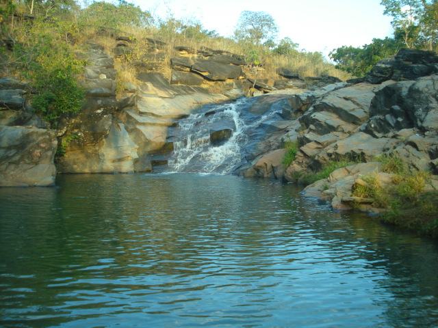 Cachoeira Caxiri no Povoado da Capela do Rio do Peixe